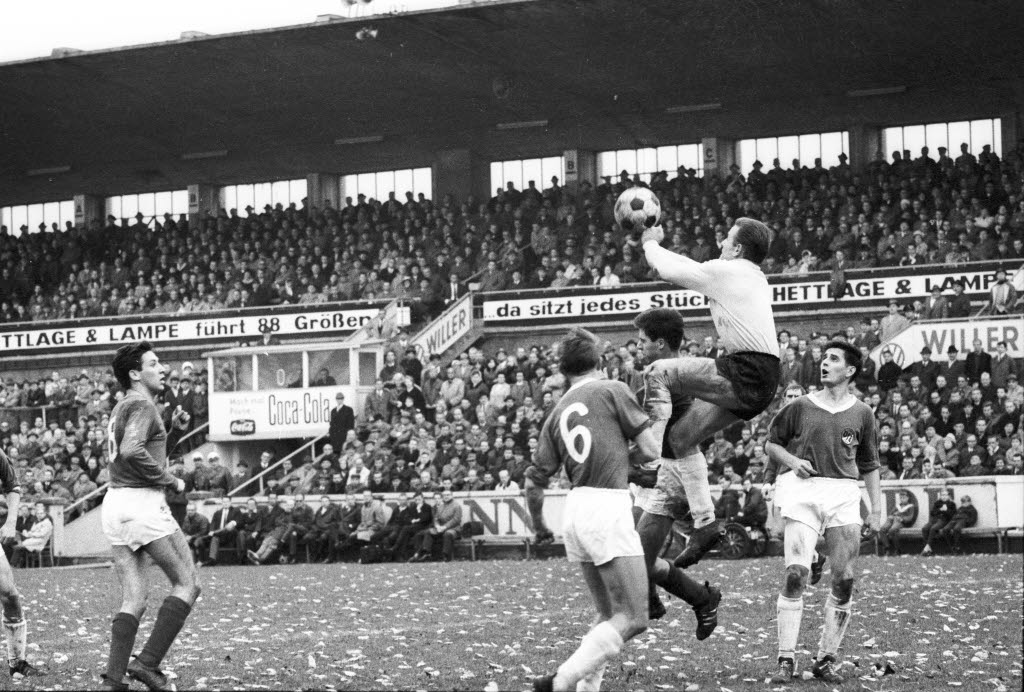 im Holsteinstadion. Im Bild u.a. Lübecks Torwart Manfred Bomke (4.v.l.),sowie Holsteins Franz-Josef Hönig (1.v.l.) und Otto Hartz (3.v.l.).